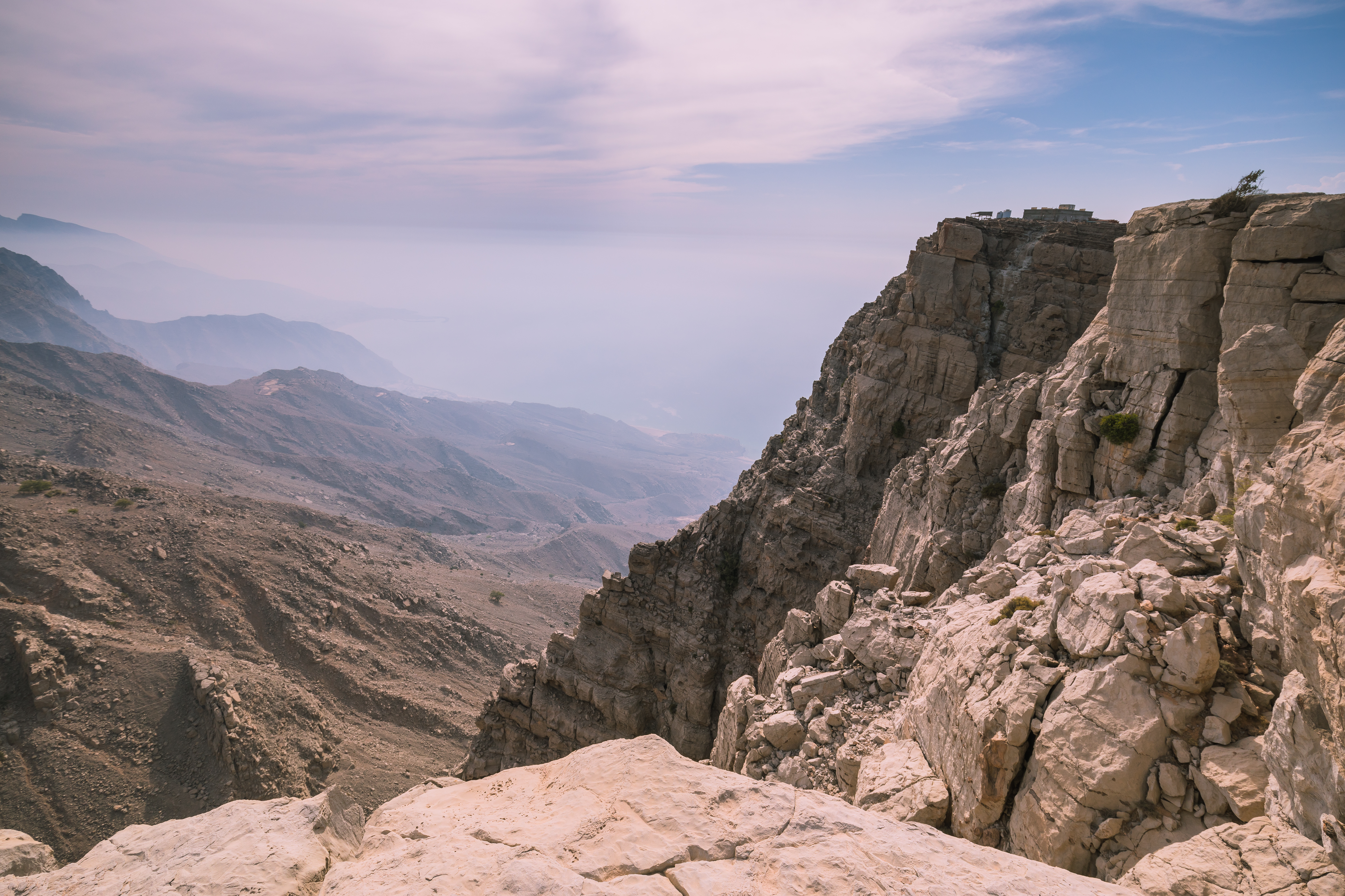 Musandam Peninsula, Oman.